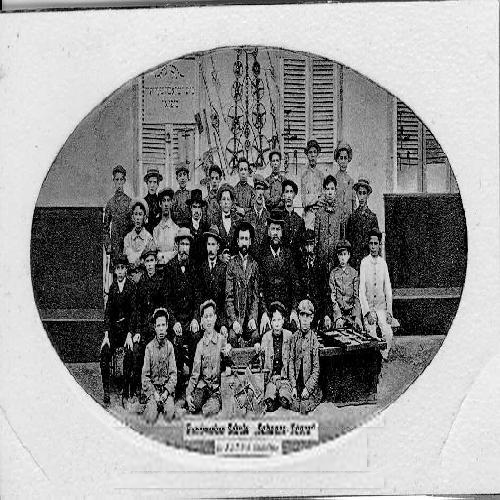 בית- הספר למלאכה ביפו " שערי תורה" המורים והתלמידים( ת. מ. 1900) .